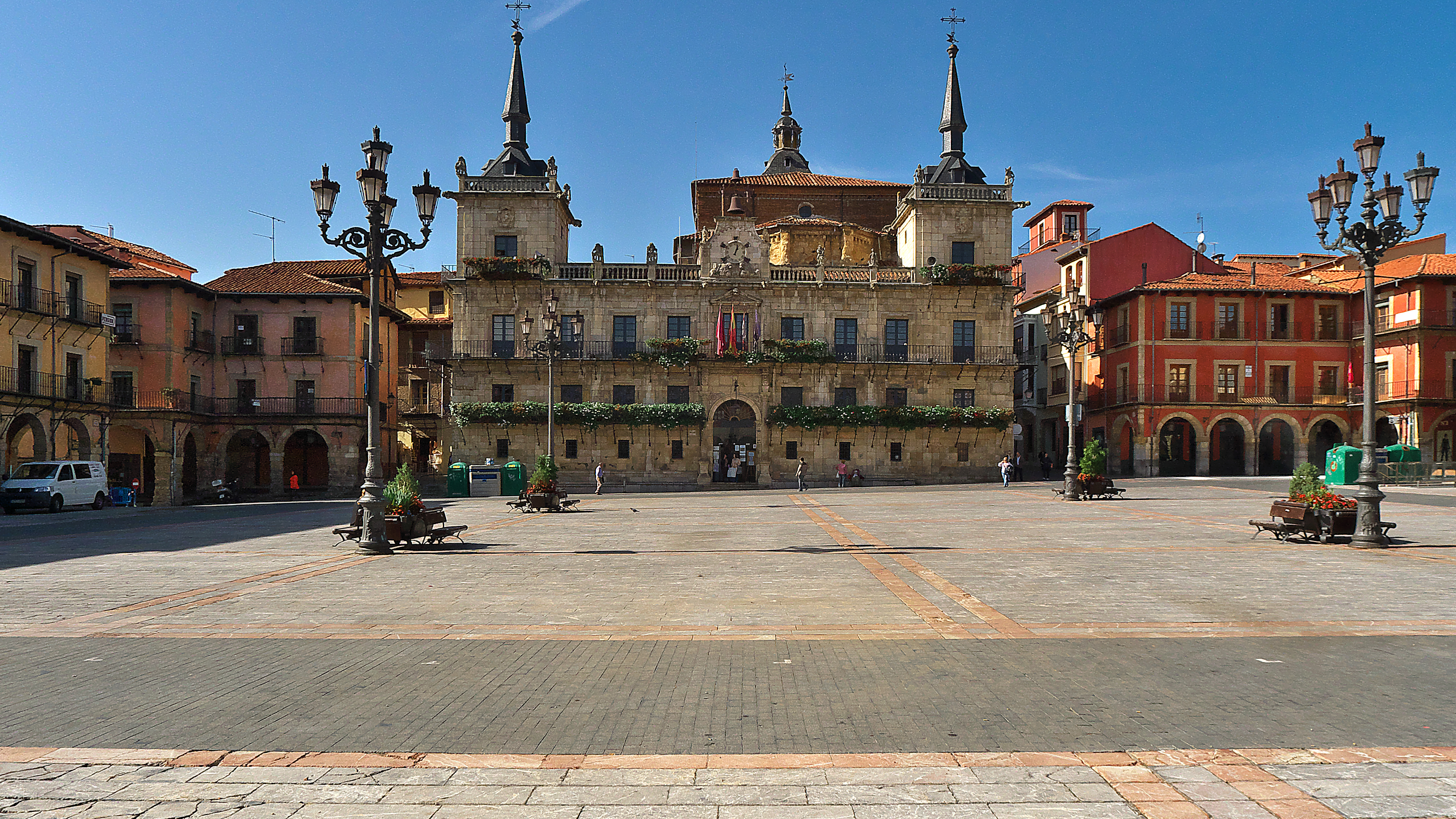 Francisco de la Lastra Alvear planifica la plaza mayor de León (1677)